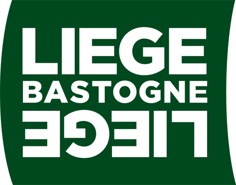 Logo von Lüttich–Bastogne–Lüttich